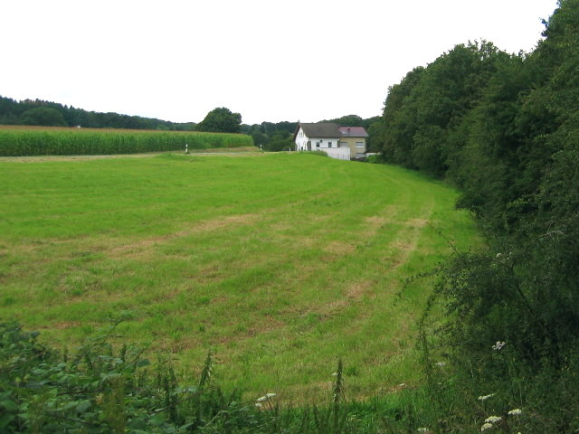 Alte Bahngebäude des Haltepunkts Asbeck (landläufig „Bahnhof Asbeck“ genannt) an der Neuenlander Straße in Gevelsberg-Asbeck. Das Buschwerk rechts im Bild markiert die Grenze zwischen Asbeck und Silschede, dahinter verläuft die ehemalige Bahnstrecke Witten–Schwelm. Abgebildeter Bereich gelegen im Landschaftsschutzgebiet 3.2.4 „Asbeck“.